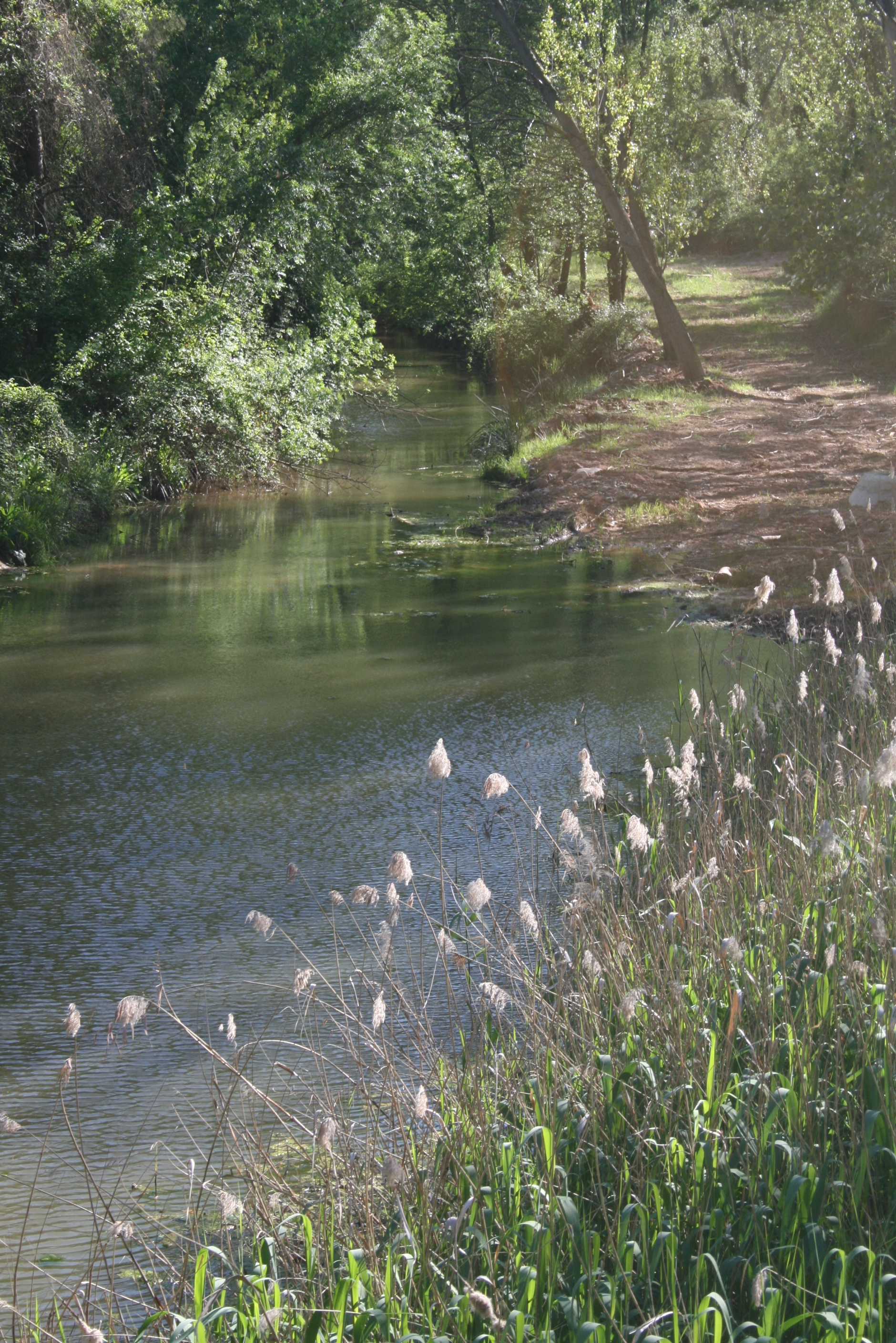 Riera de Fonollosa, entre Canet de Fals i Sant Joan de Vilatorrada..